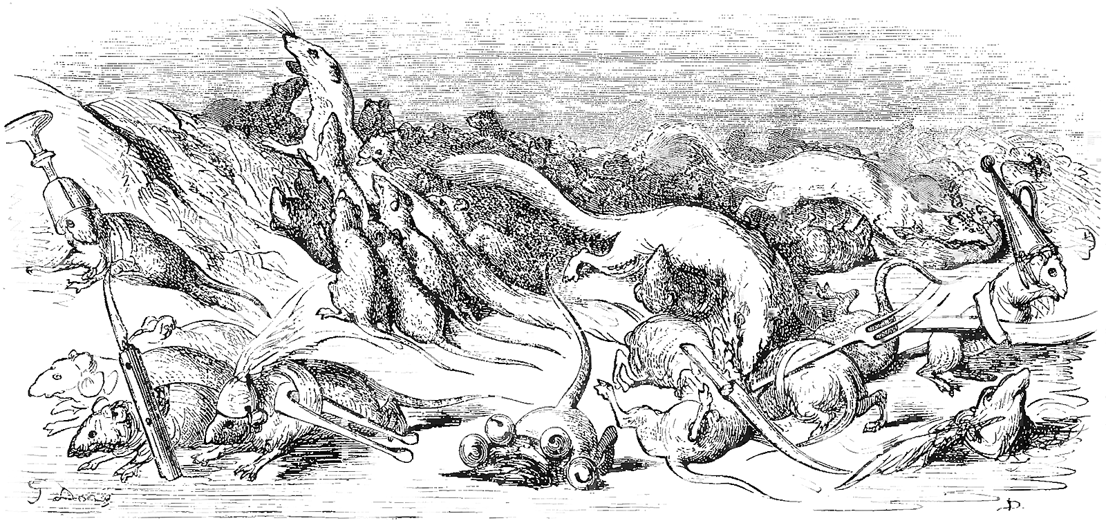 grafika z książki PL Bajki, Jean de La Fontaine, nakładem i drukiem Jana Noskowskiego, Warszawa 1876